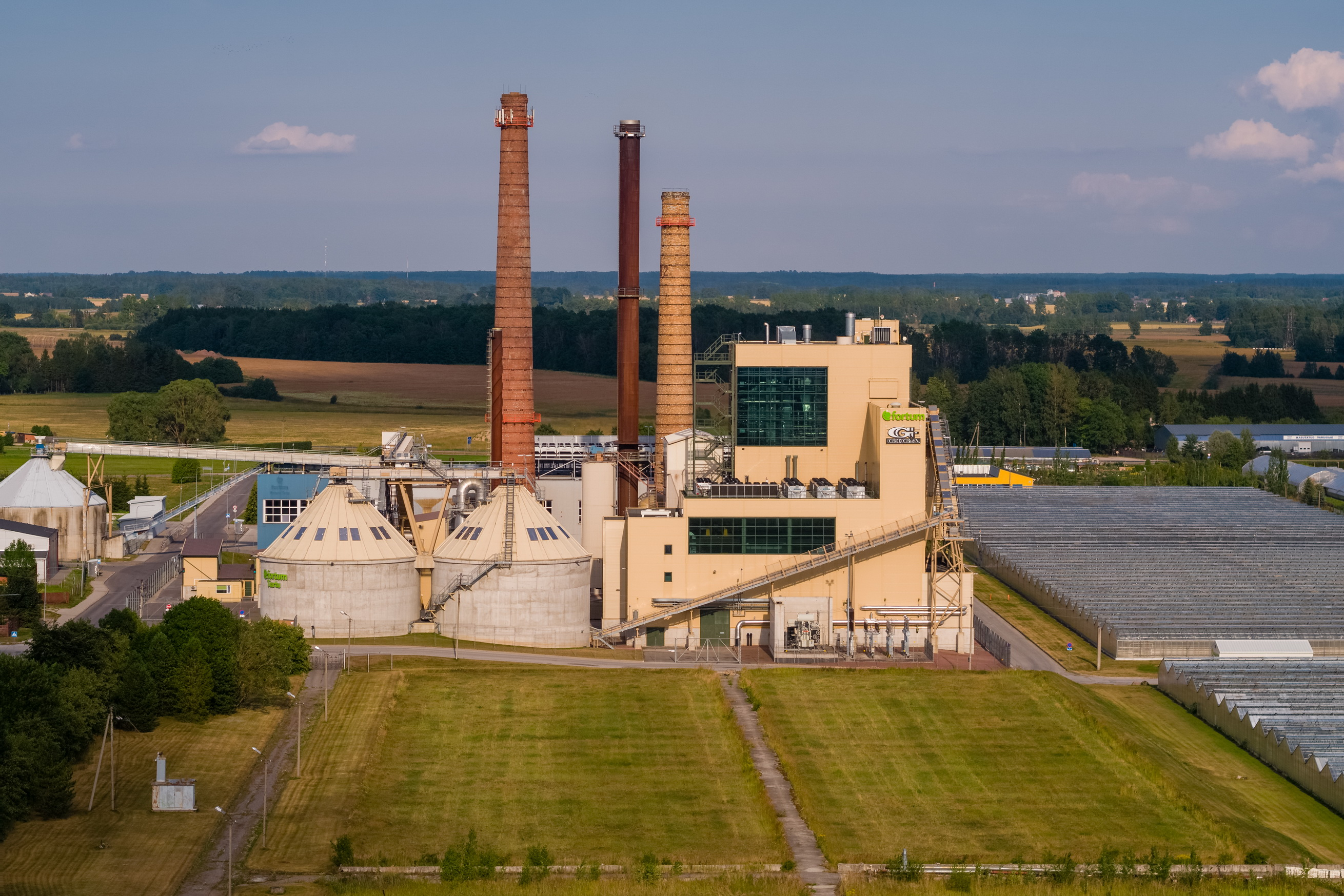 Tartu Elektrijaam